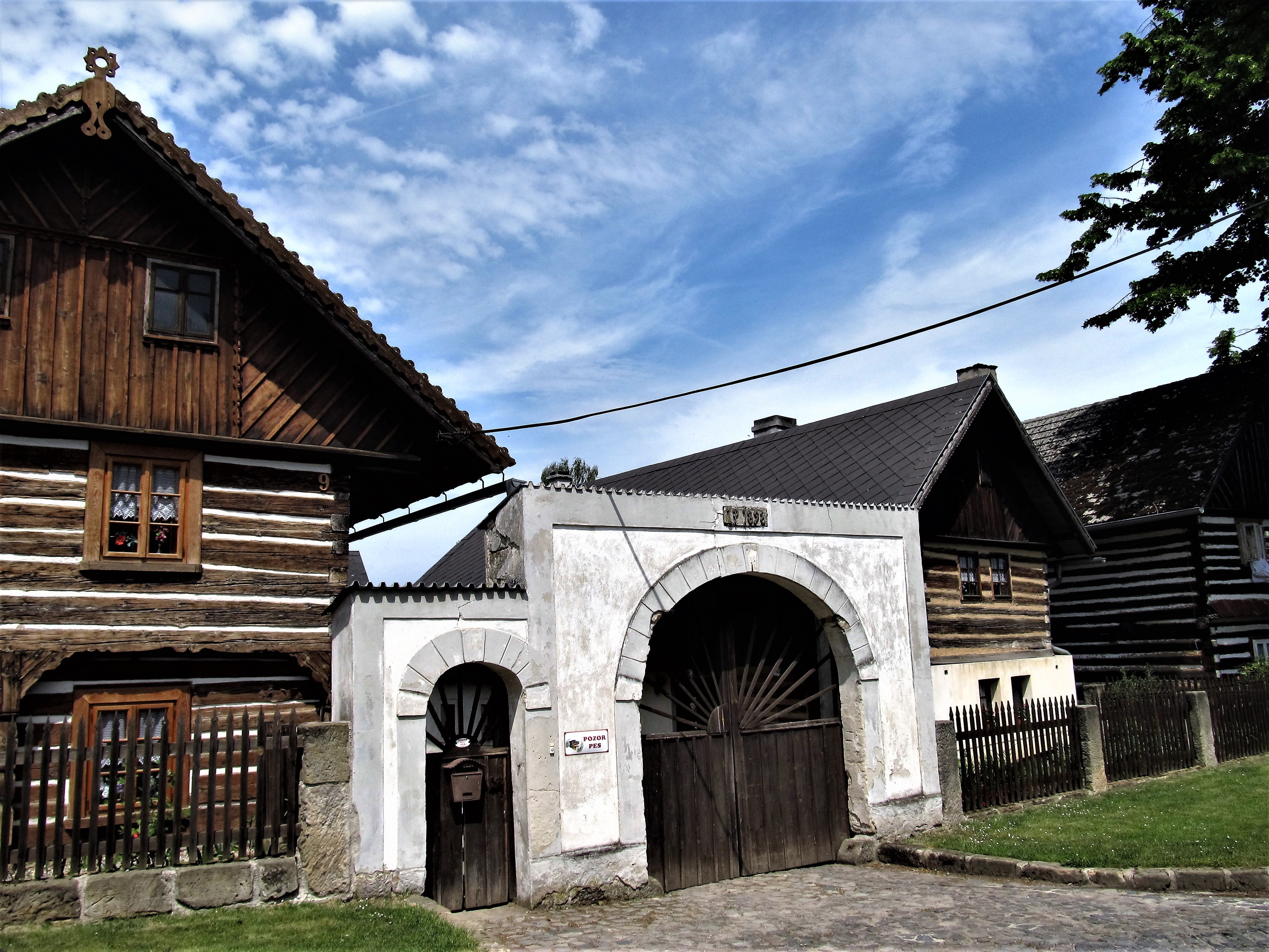 Vesnická památková rezervace Nosálov